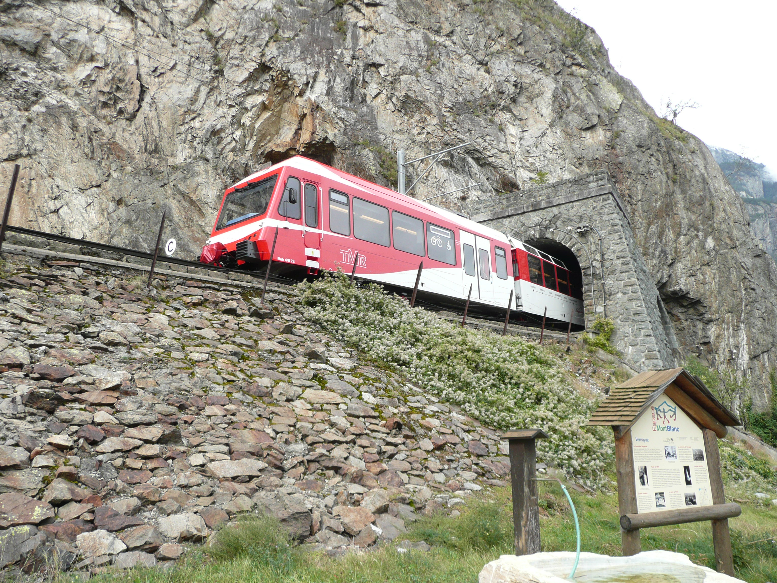 Zug der Martigny–Châtelard-Bahn am Beginn des Zahnstangenabschnittes hinter Vernayaz MC in Richtung Châtelard